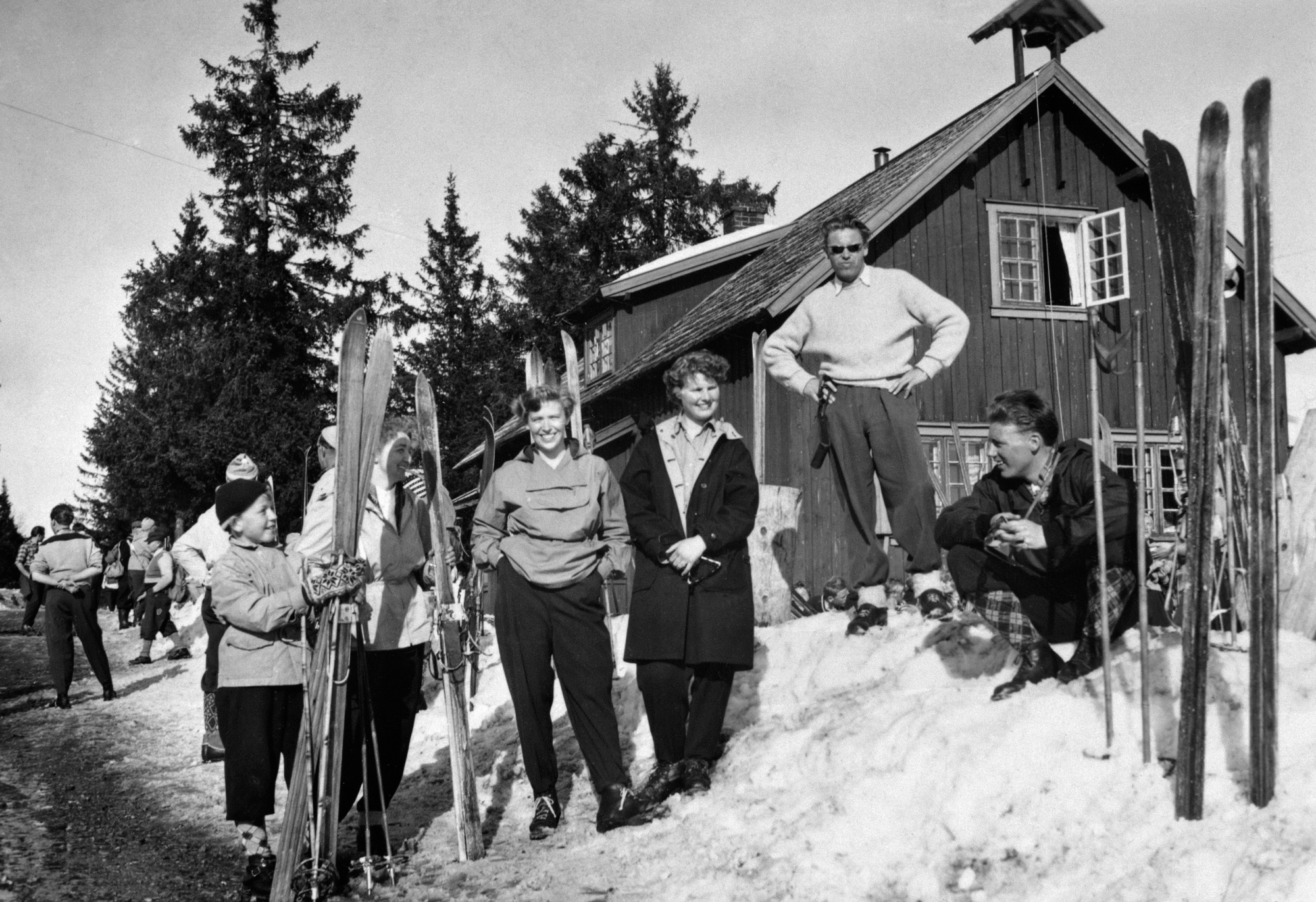 Fra Budor i Løten. Ukjent fotograf, ca. 1956–57. Fra Domkirkeoddens fotosamling i Digitalt museum.